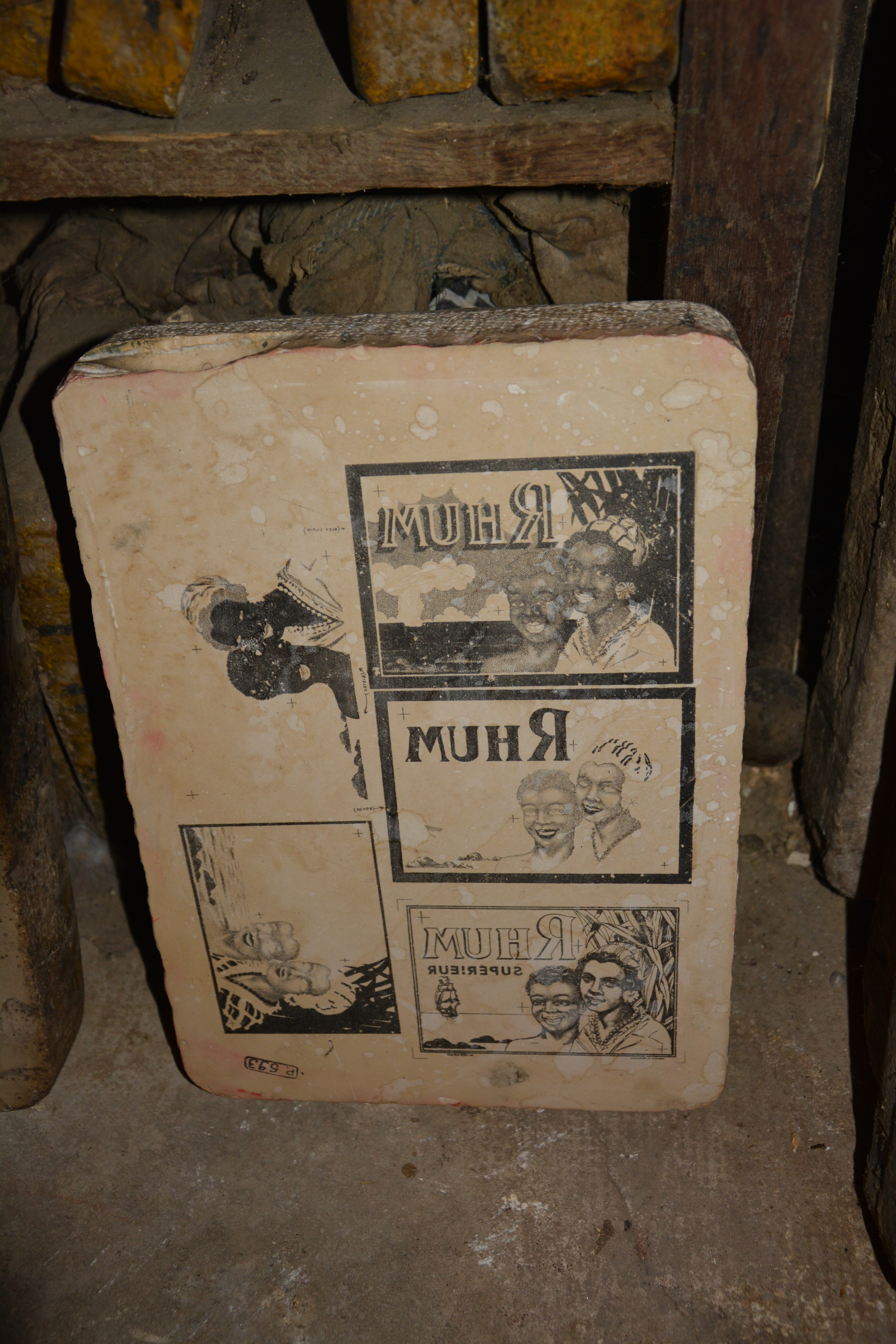 Sous sol de l'imprimerie PAM - lithographies